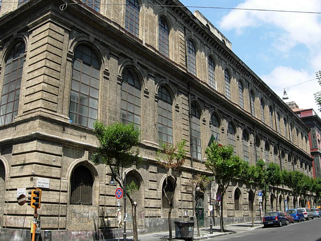 Palazzo dell'Accademia delle Belle Arti di Napoli Foto personale concessa in PD